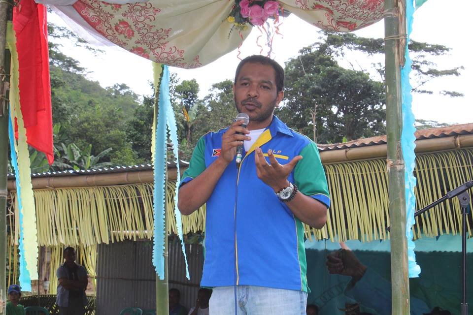 Fidelis Magalhaes in Lolotoe